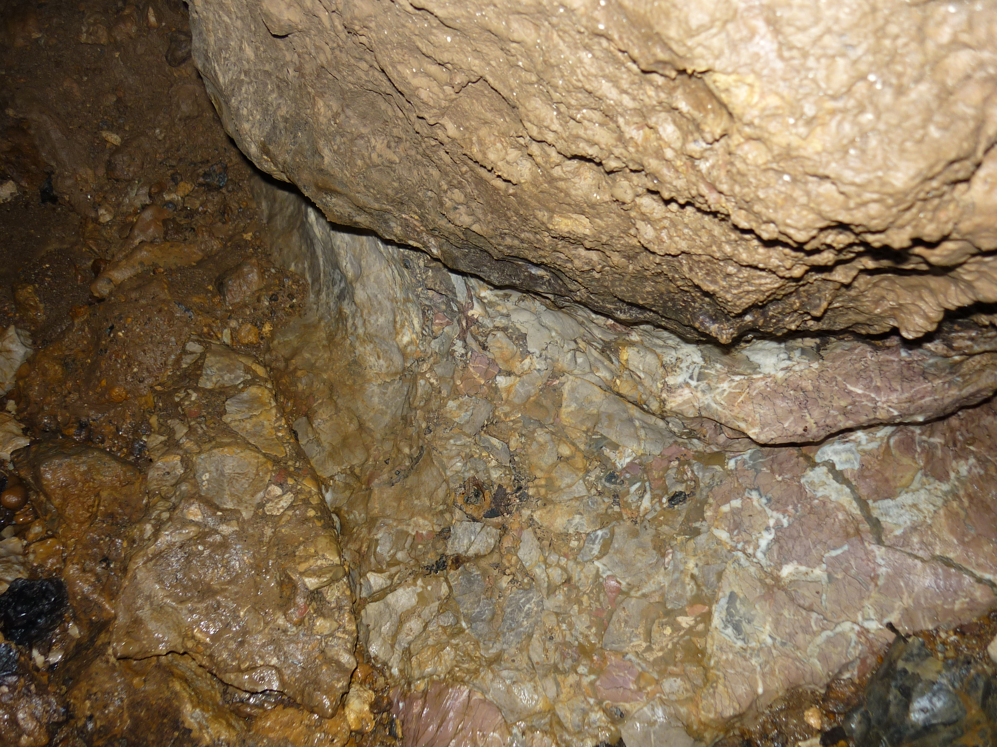 Tektonikus breccsa: hallstatti mészkőtörmelék karbonátos cementben (Perkupa, Kubai-Magyar Barátság Fehér-barlang)